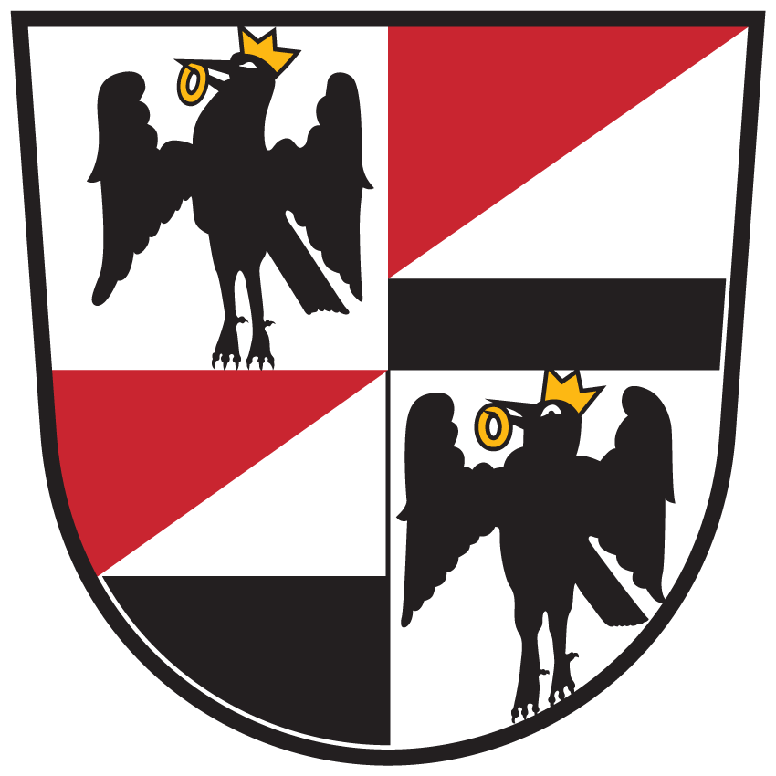 Wappen von Ebenthal